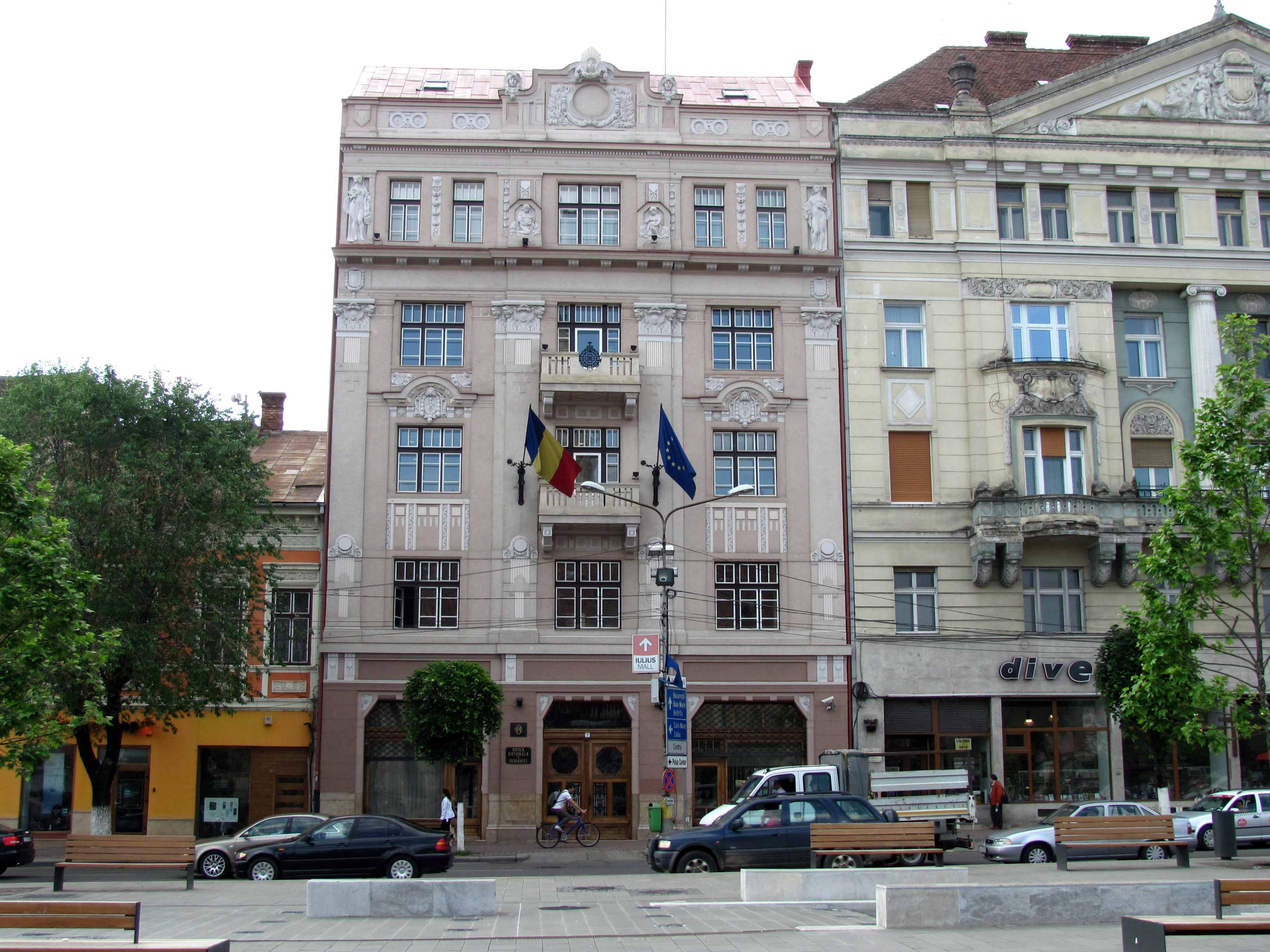 Cluj-Napoca - Piața Unirii, nr.7 - B.N.R